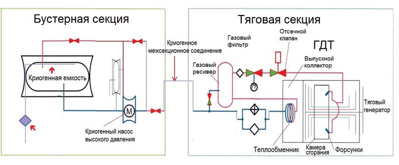 Топливная система газотурбовоза ГТ1h-002